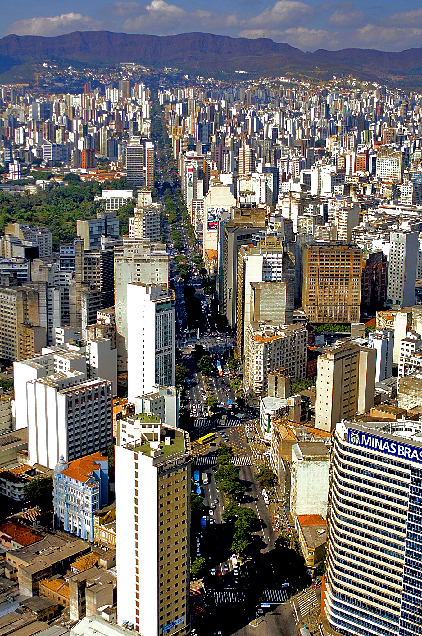 Vista parcial de Belo Horizonte, com destaque para a Avenida Afonso Pena e Serra do Curral.